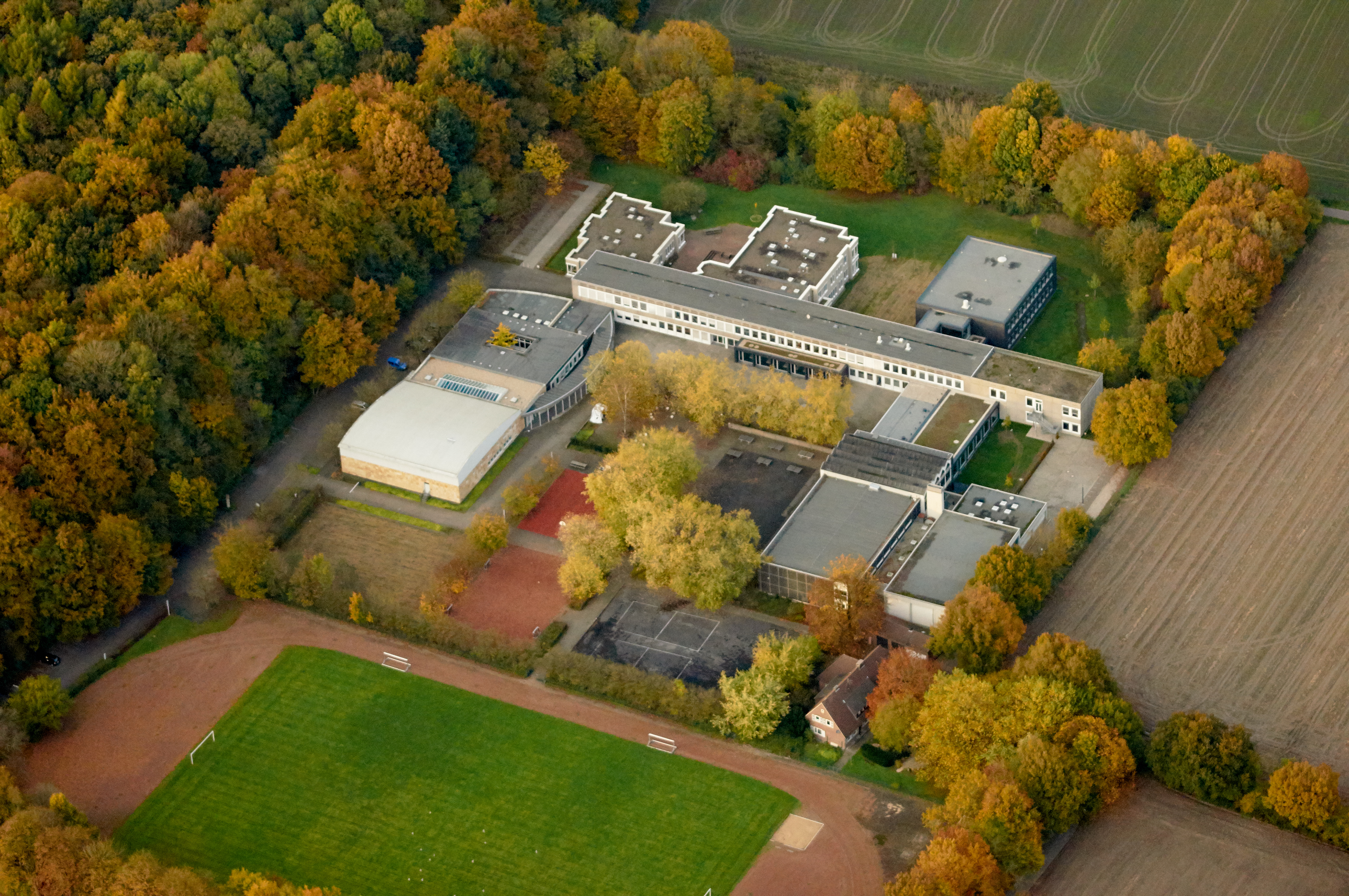 St.-Pius-Gymnasium in Coesfeld, Nordrhein-Westfalen, Deutschland.